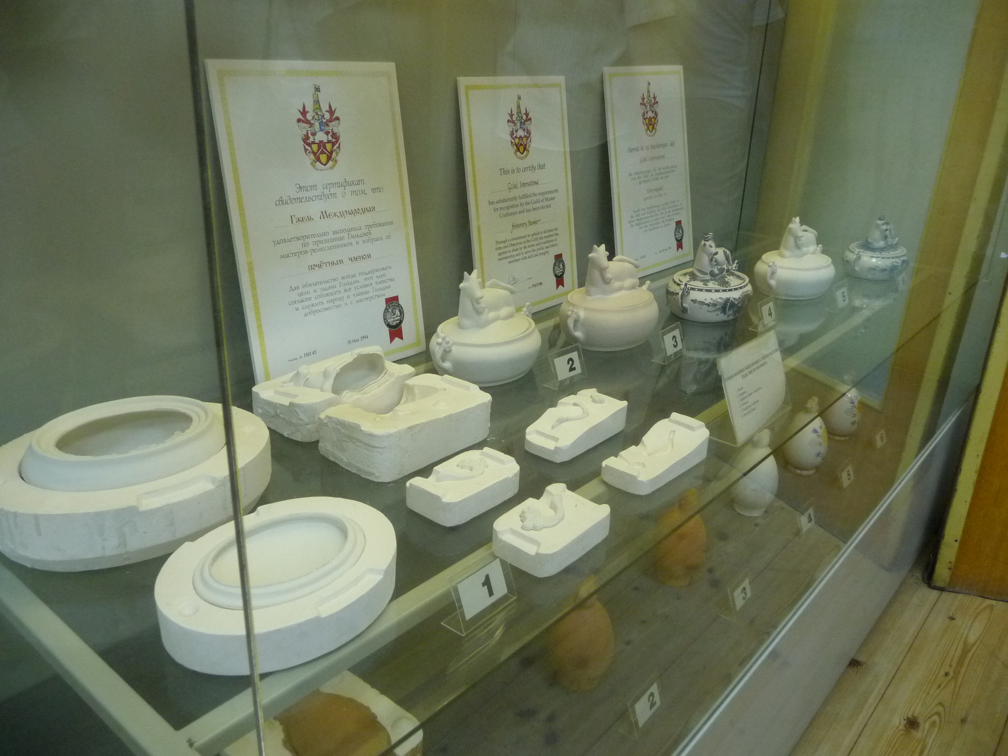 MoscowRegion-Gzhel-p1030260.jpg